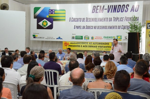 A segunda edição realiza em Costa Rica, abordou o tema: “O papel da Sudeco no desenvolvimento do Centro-Oeste”